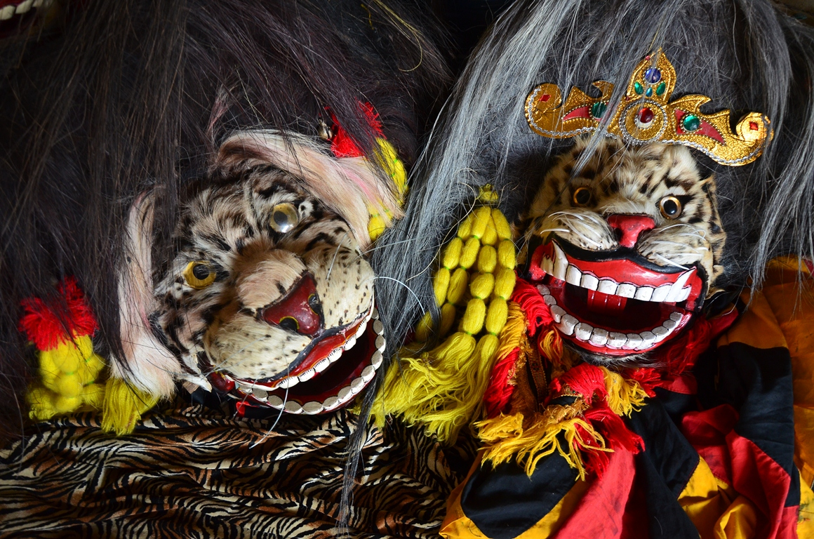 Ini merupakan salah satu kesenian dari daerah Blora, Central Java, Indonesia